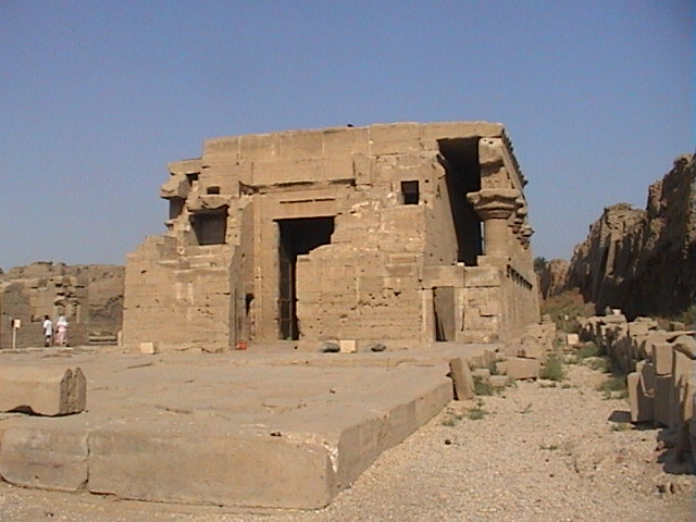 Vue du mammisi d'époque romaine du grand temple d'Hathor de Denderah